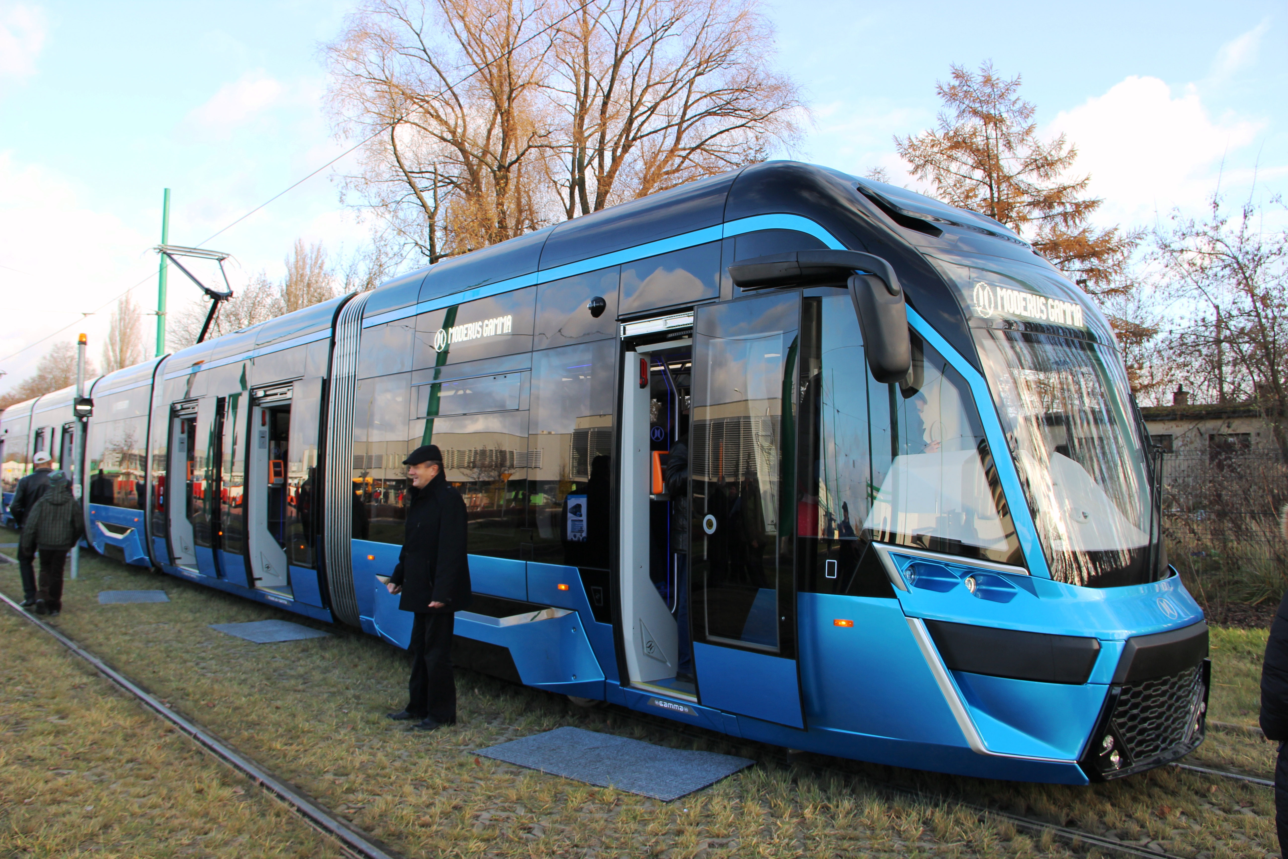 Moderus Gamma/Katarzynki 2016.